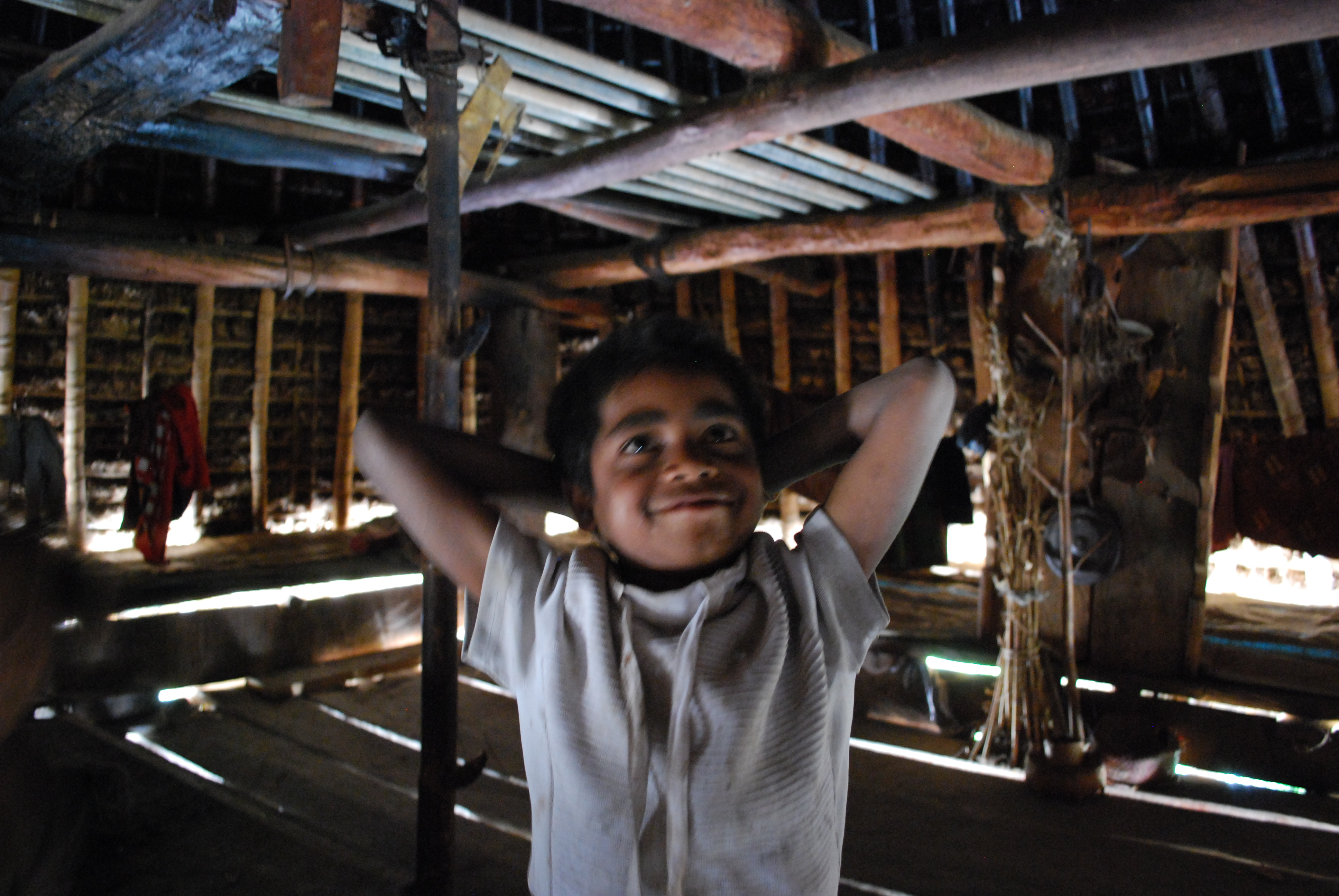 Uma Lulik in Hiut Lei, Maubisse